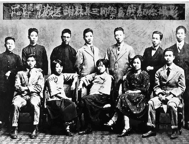 中文（台灣）: 由上海大學派赴莫斯科留學前，台共領導人謝雪紅（前排右二）與林木順（前排右一）等人合影留念